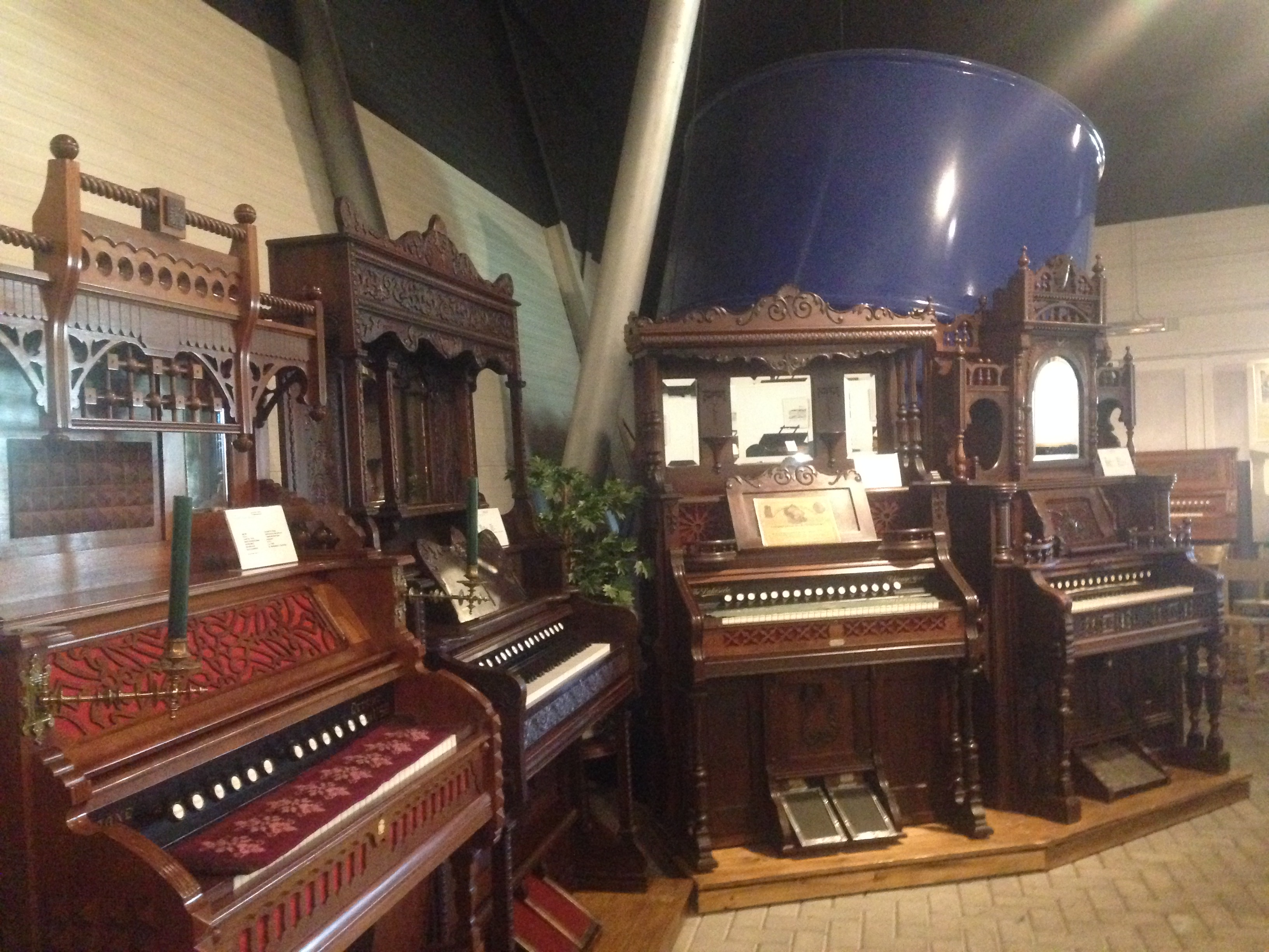 Harmonium Museum Nederland, Veenpark, Barger-Compascuum, Netherlands